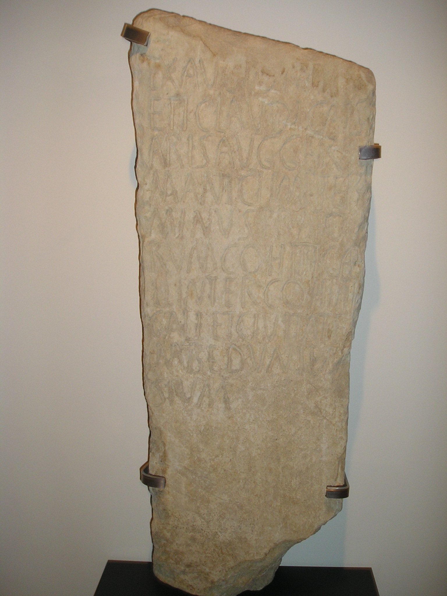 Inscripción AE 1935, 13, correspondiente al Terminus Augustalis de la Cohors IV Gallorum de Castrocalbón (León), encontrado en Santa Colomba de la Vega, atualmente en el Museo de León, cuto texto dice. EX AVCTORITAT/E TI(berii) CLAVDII CAES/ARIS AVG(usti) GER/MANICI TER/MINVS PRATO/RVM COH(ors) IIII G(allorum)/ INTER COH(ortem) IIII/ GALL(orum) ET CIVITATE/M BEDVNIEN/SIVM